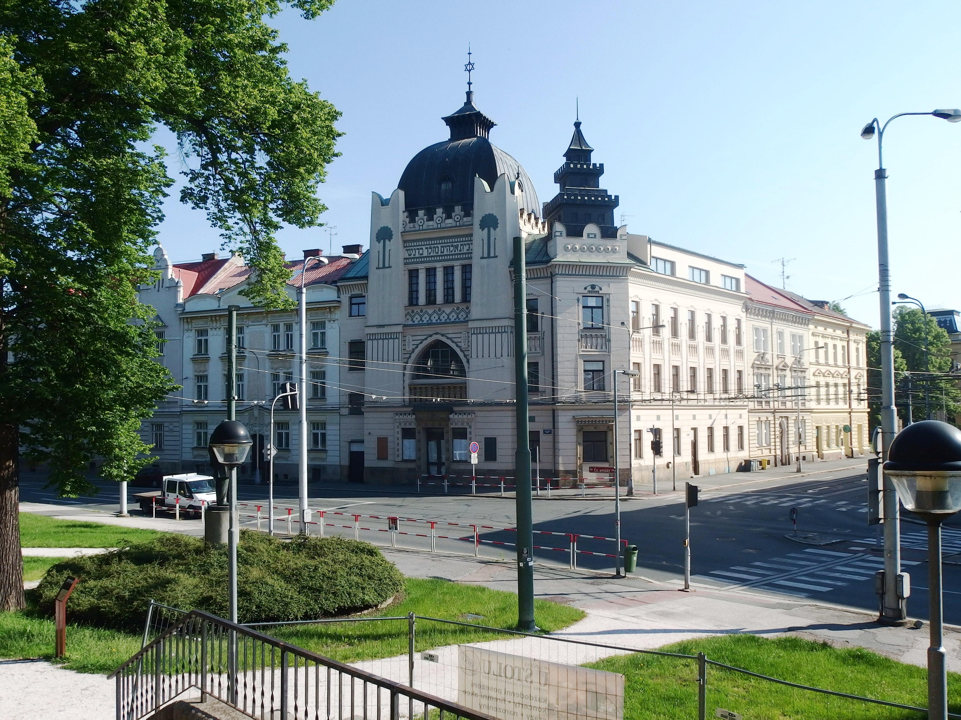 Synagoga, Pospíšilova 395/1, Československé armády, Hradec Králové (místní část).